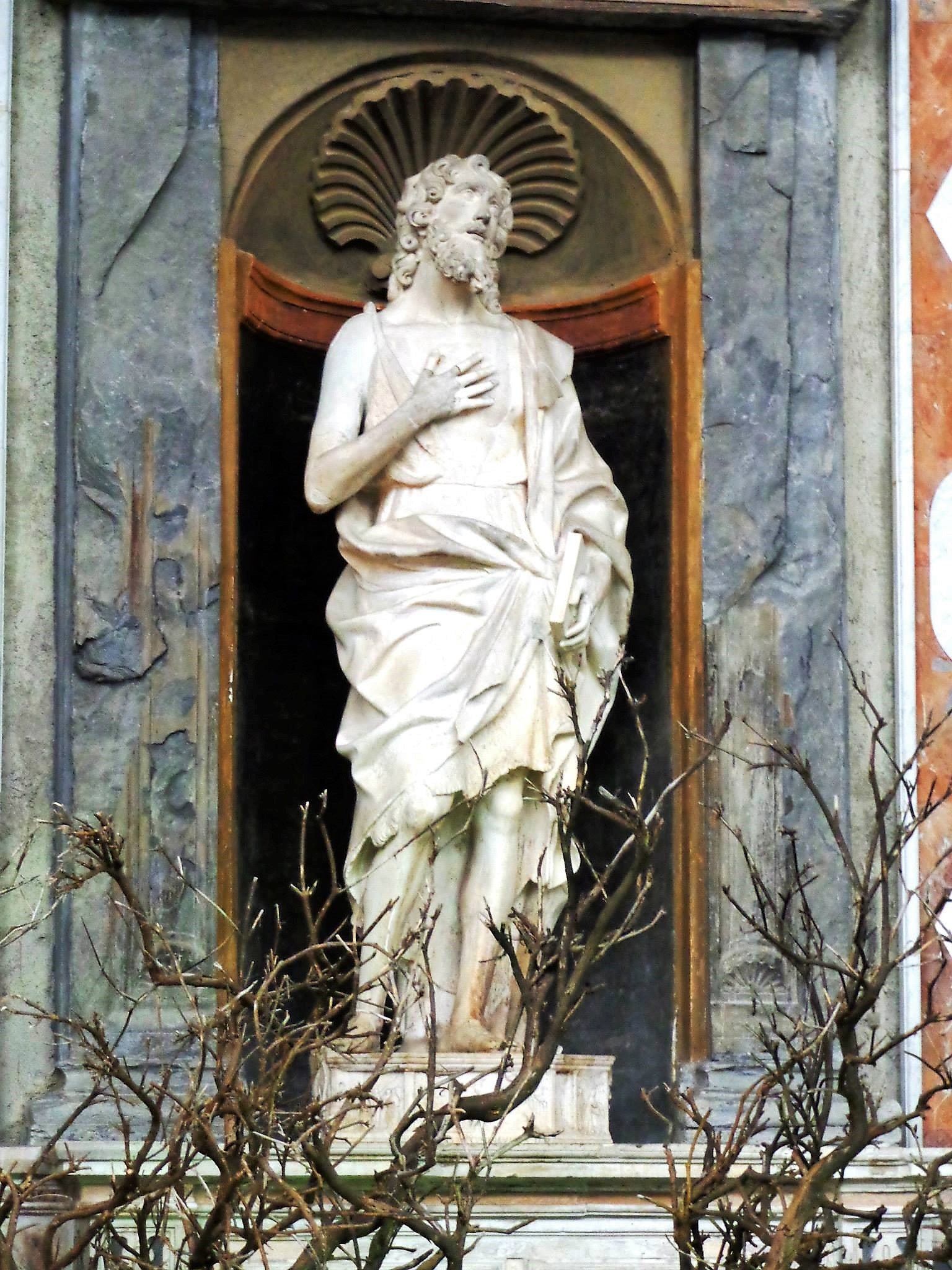 San Giovanni Battista Gagini